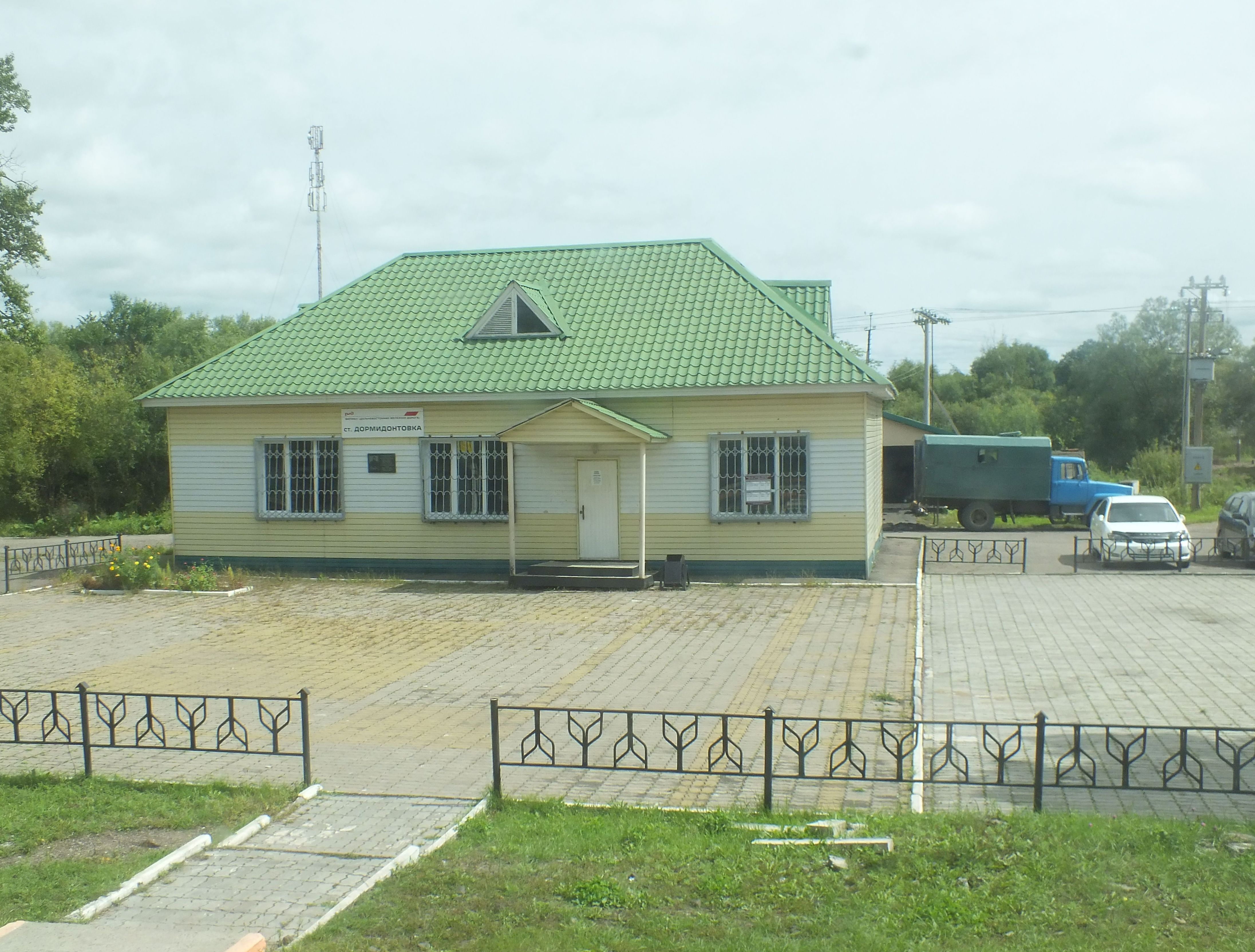 Вокзал станции Дормидонтовка Хабаровский край